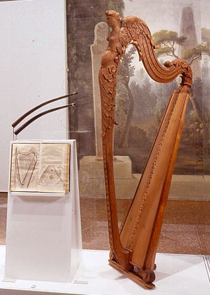 Arpa italiana tripla